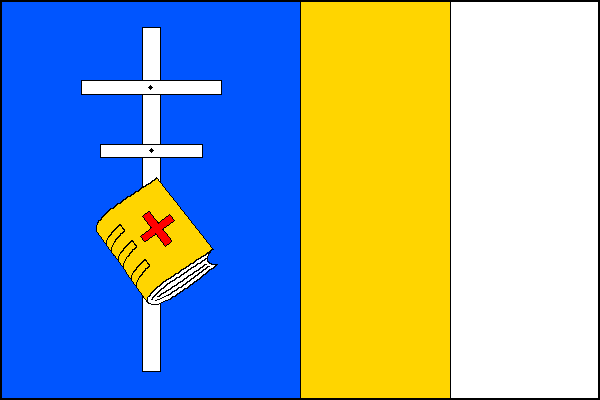 vlajka, Pavlov, okres Žďár nad Sázavou